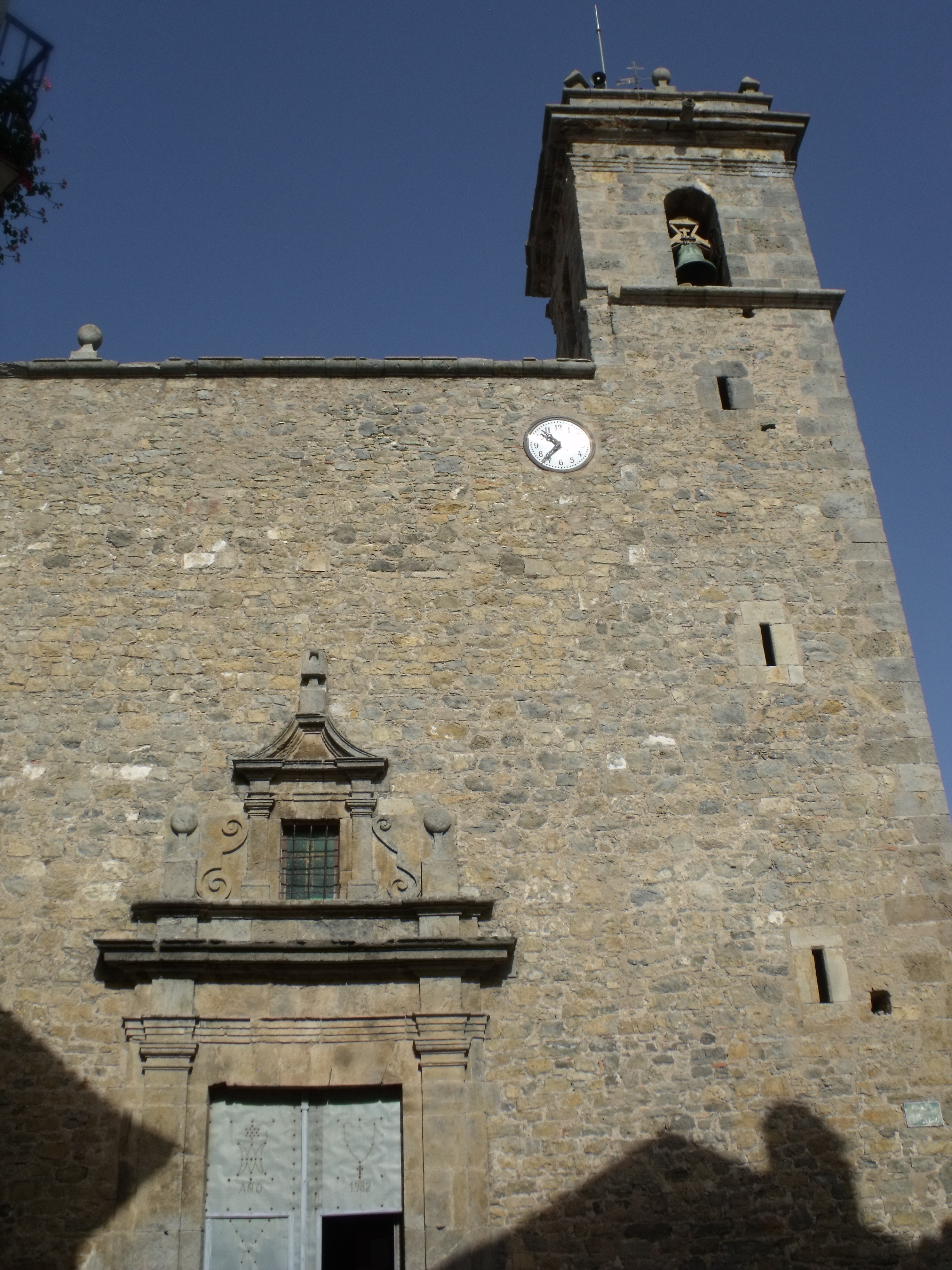 Fachada de la Iglesia de Santo Domingo de Guzmán